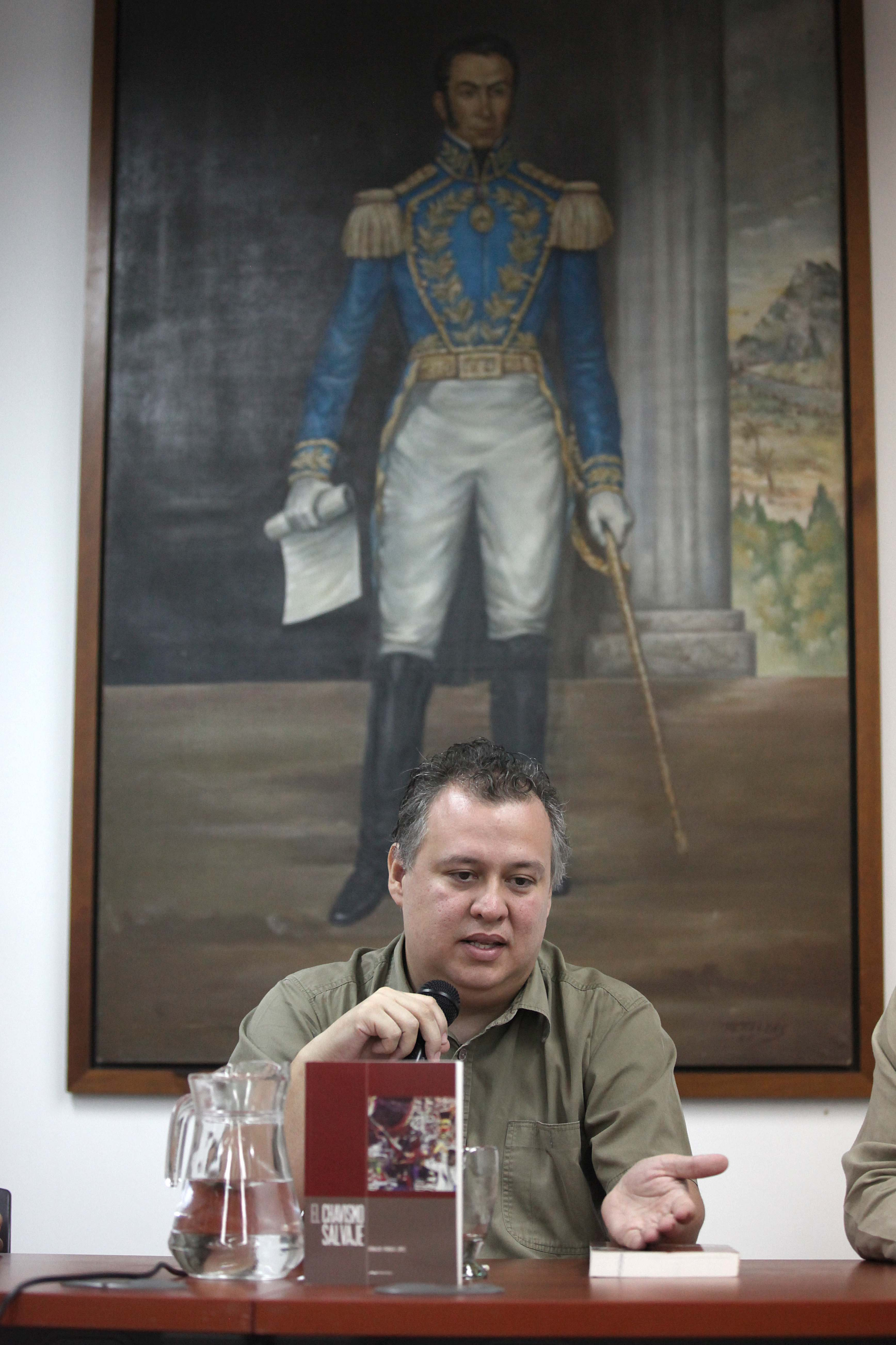 Reinaldo Iturriza López durante la presentación de El chavismo salvaje. Foto: Marcos Colina.